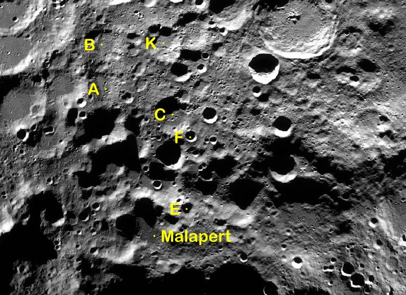 Cráter lunar Malapert. Cráteres satélite. (Imagen LRO)